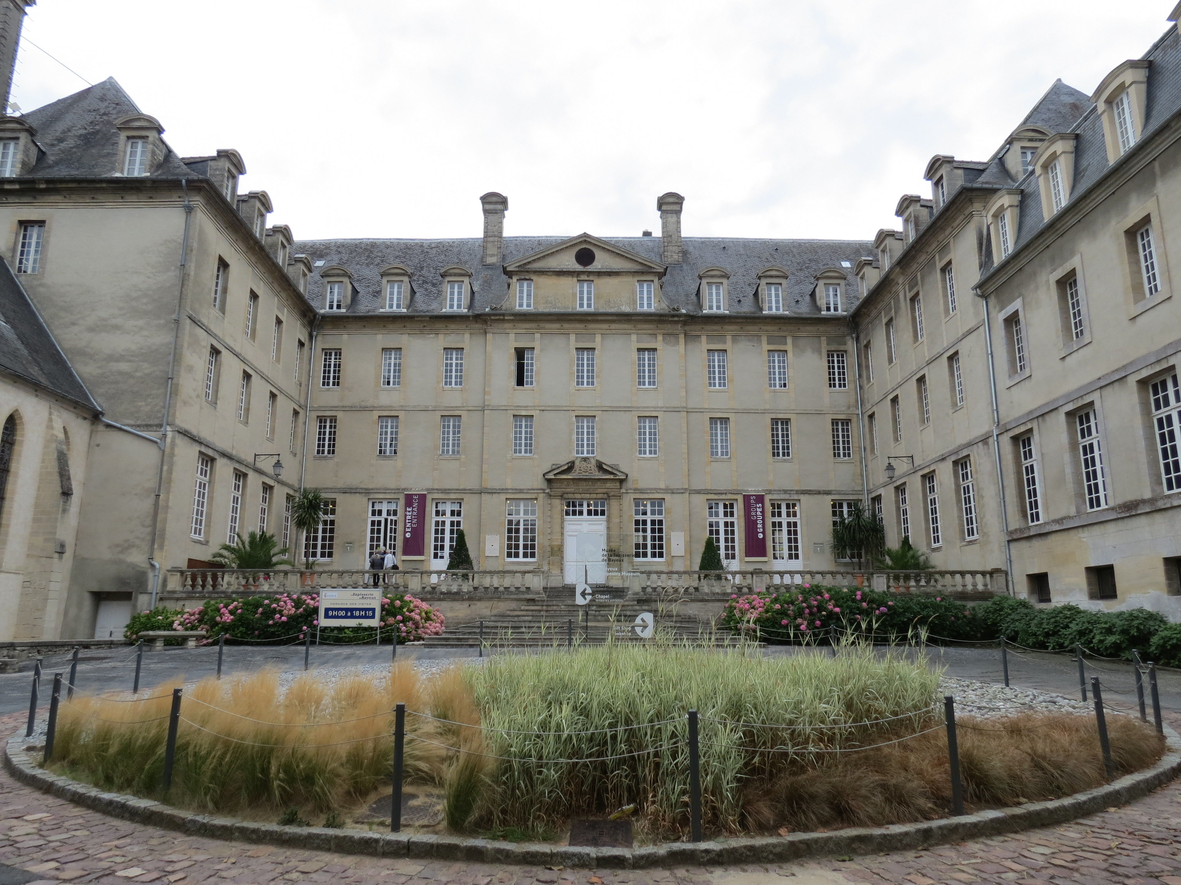 Séminaire, Bayeux, Normandie.